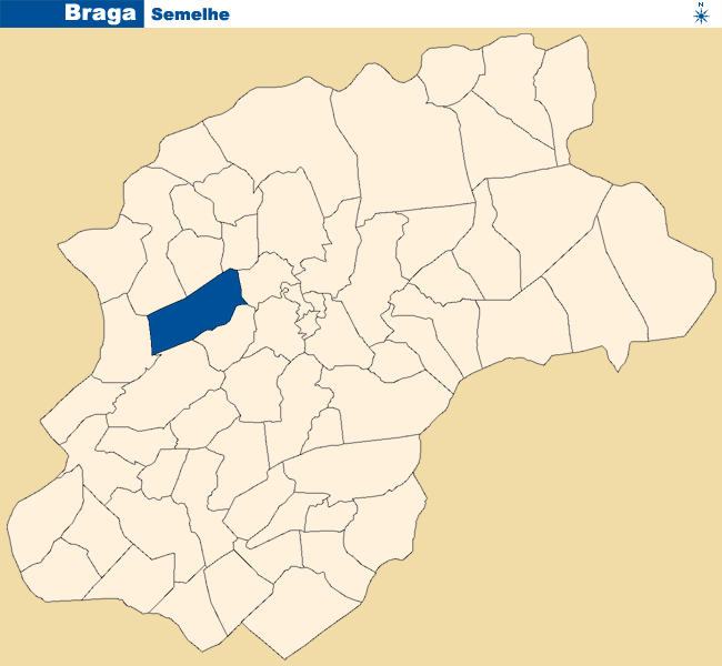 Localização de Semelhe no concelho de Braga.